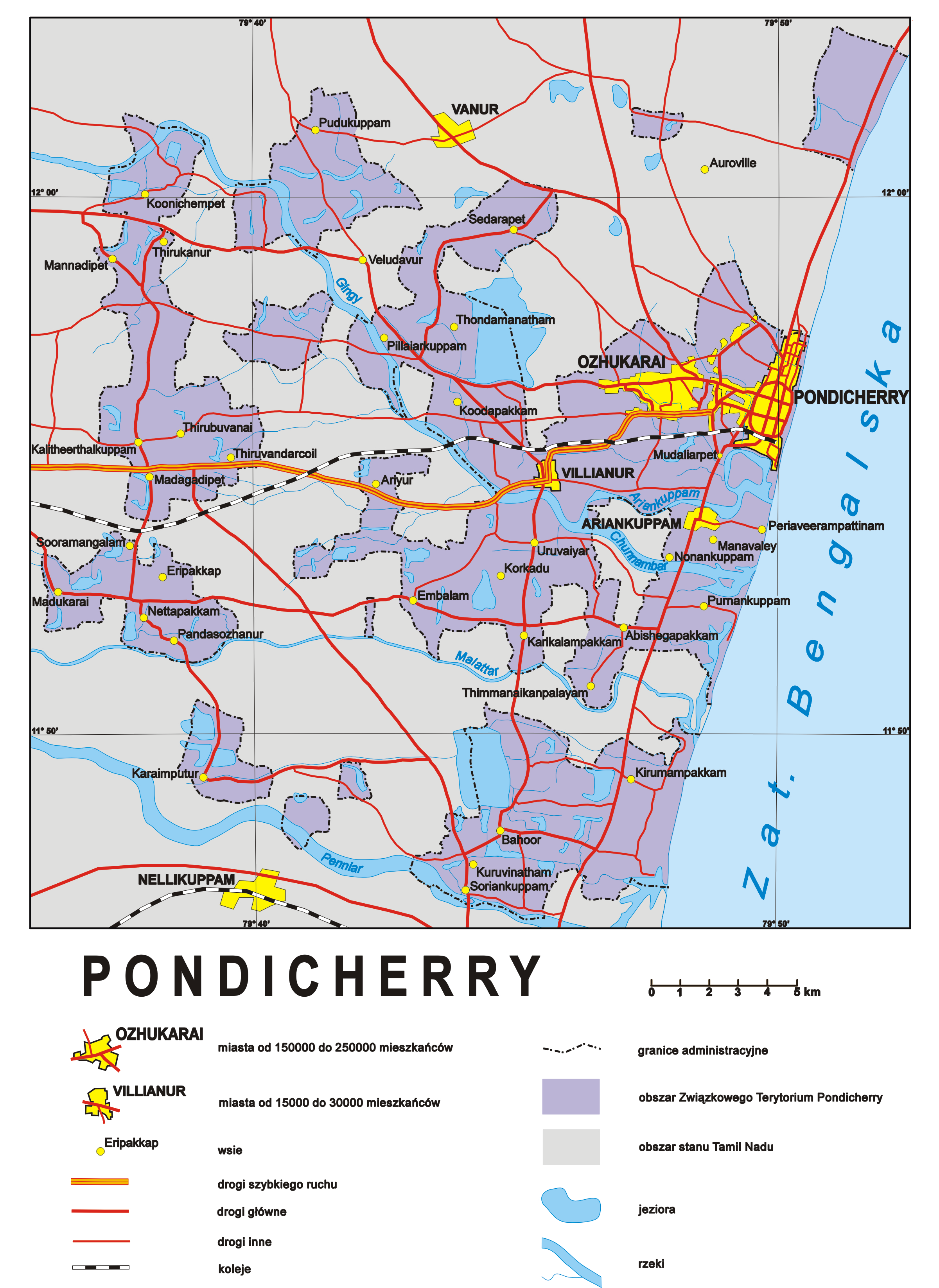 Mapa Regionu Pondicherry wchodzącego w skład indyjskiego Terytorium Związkowego Pondicherry. Autor: Aotearoa